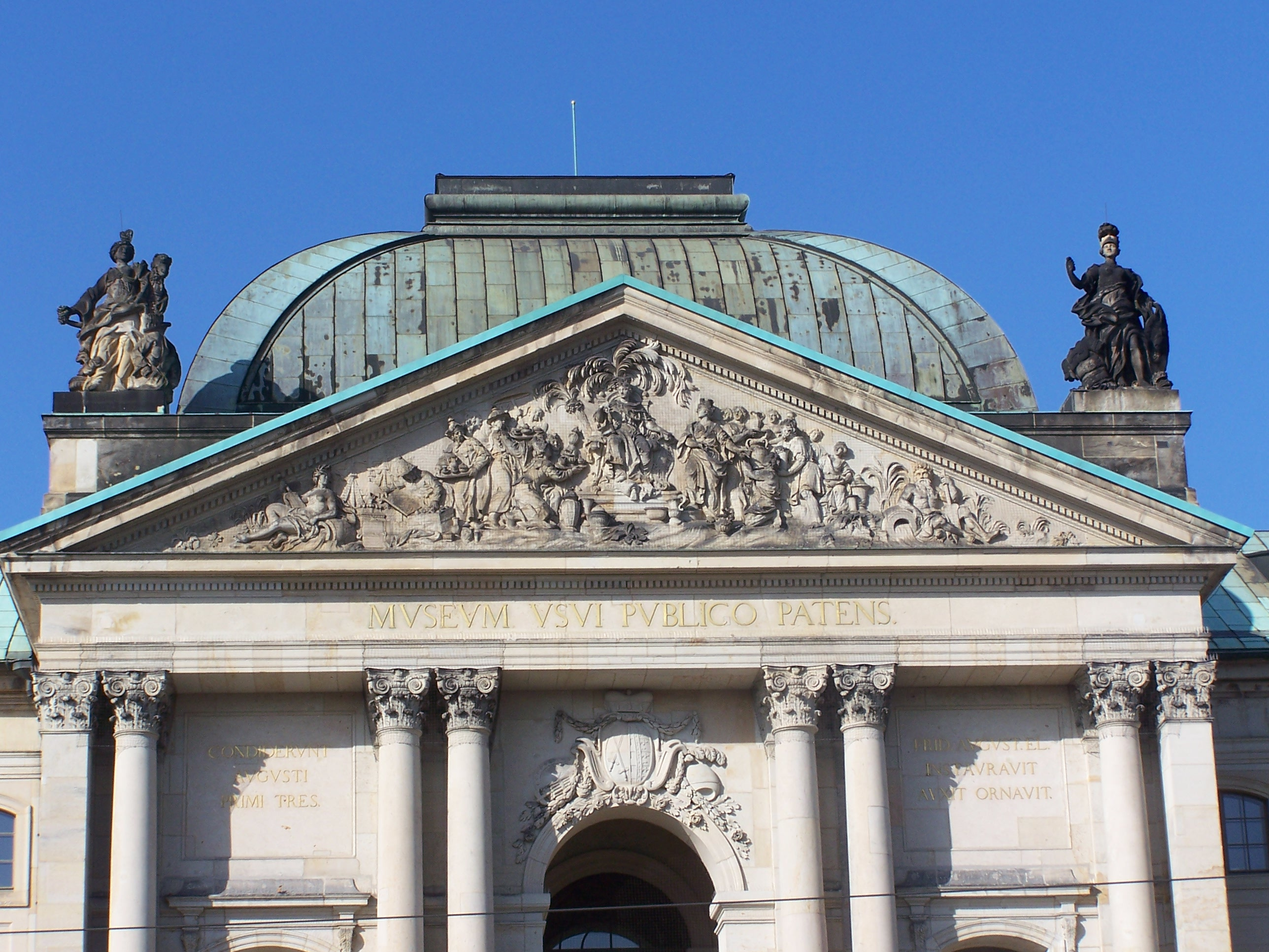 Detailansicht Japanisches Palais in Dresden